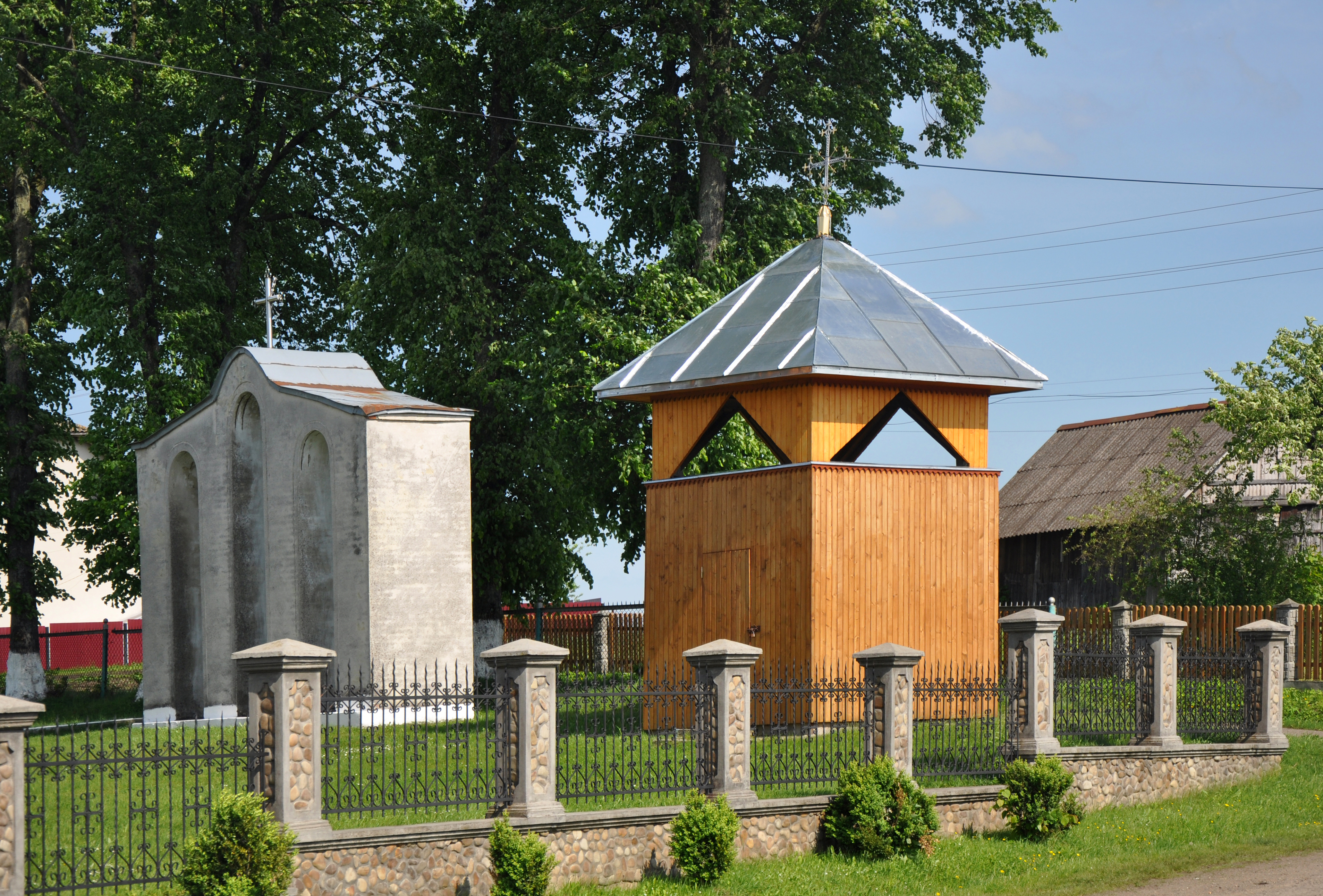 Дзвіниця церкви Воздвиження Чесного Хреста, с.Йосиповичі